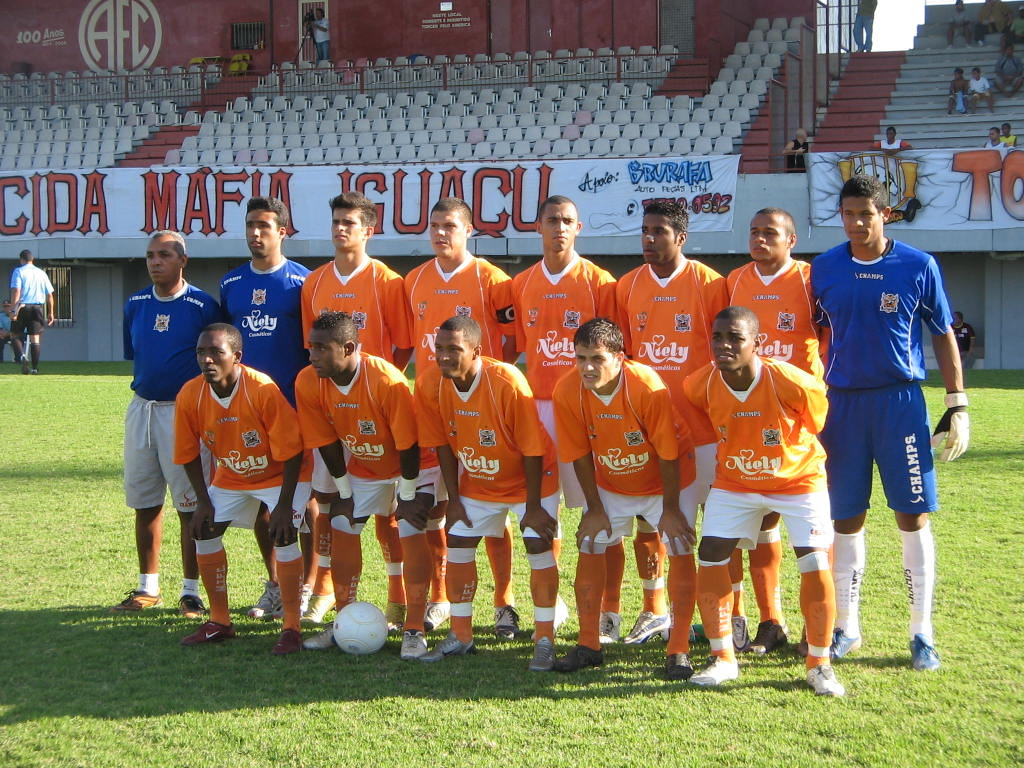 Equipe profissional do Nova Iguaçu Futebol Clube, em 2008.